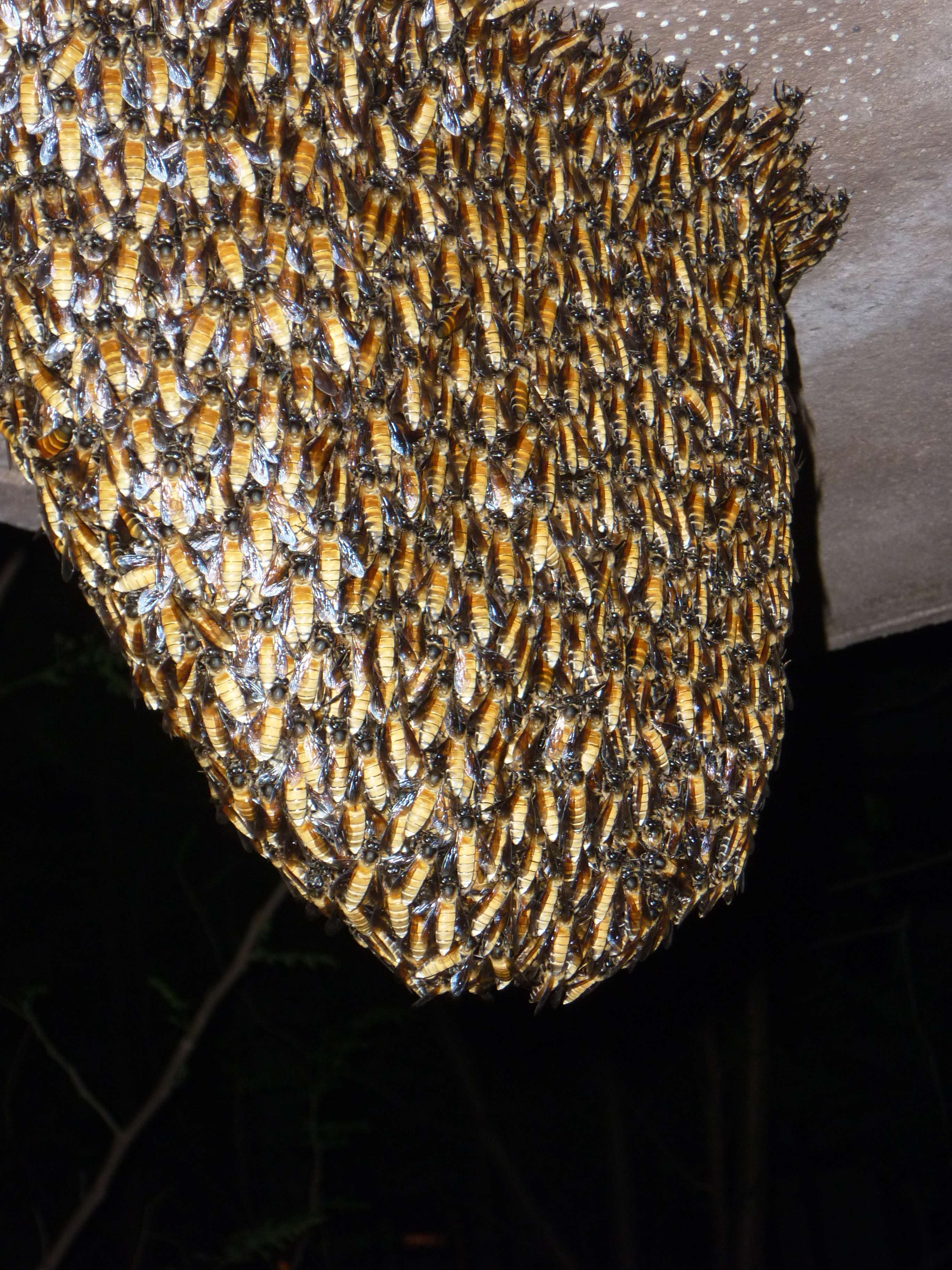 തേനീച്ചക്കൂടു്